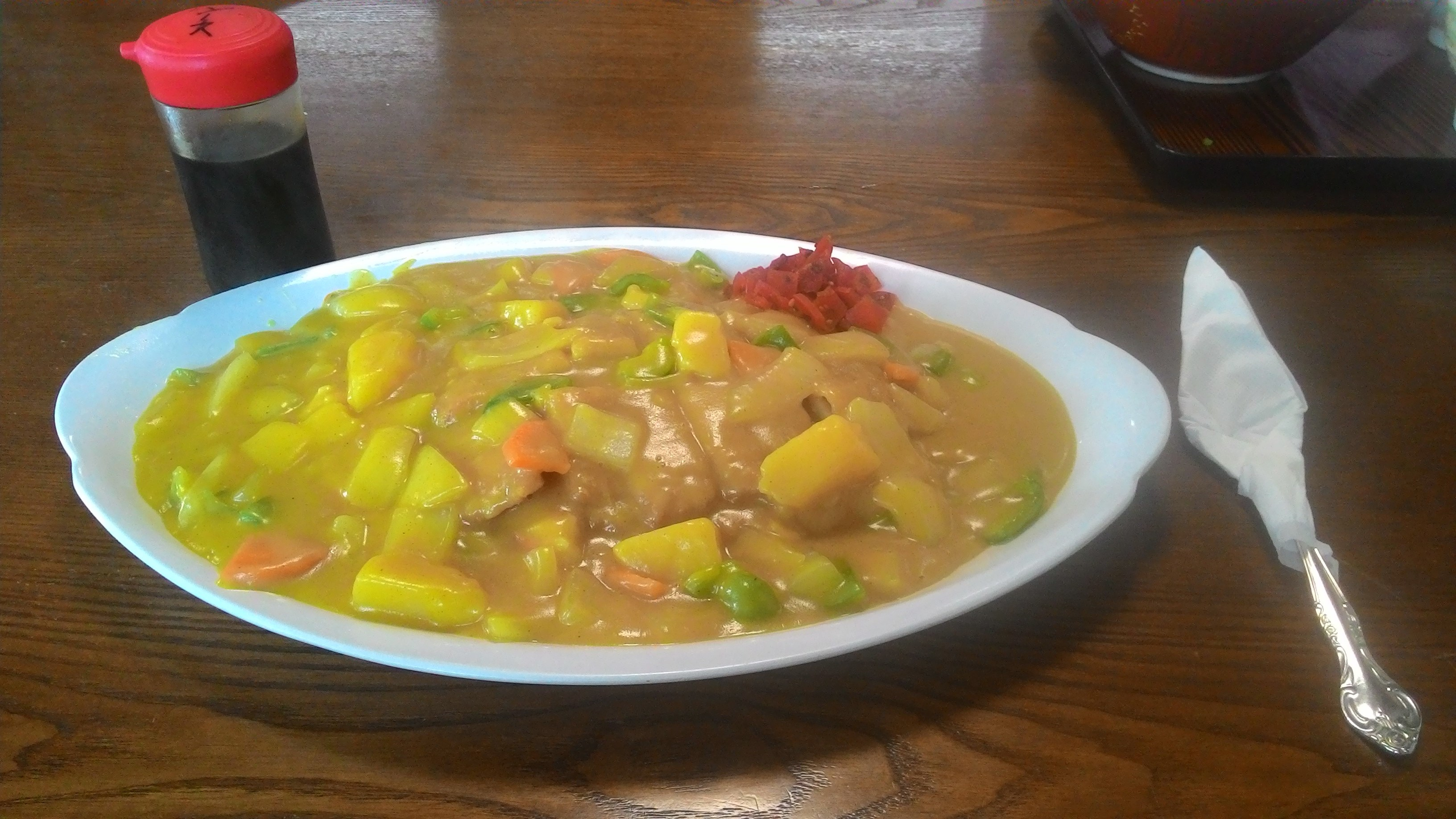 沖縄県うるま市 居酒屋江戸前のカツカレー